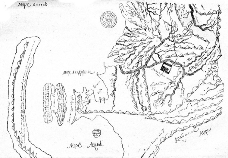 «Карта, изображающая Анадырский острог и Анадырское море». Выполнена якутским дворянином Иваном Львовым, служившим в Анадырском остроге с 1710 по 1714 год. Карта ориентирована севером книзу.